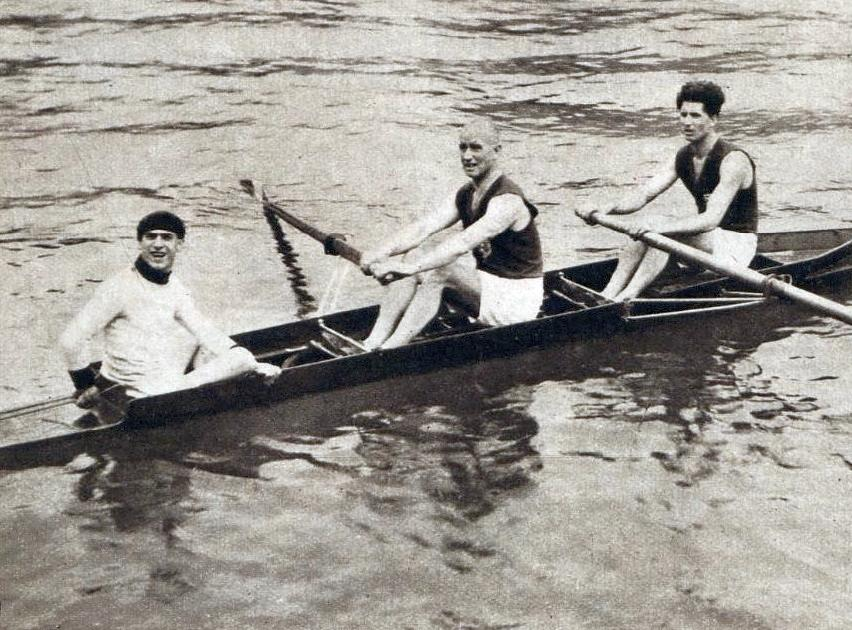 Les champions d'Europe d'aviron 1931, Anselme Brusa (G.) et André Giriat (D.), ici en juin 1932 (en preparation pour les JO de Los Angeles).